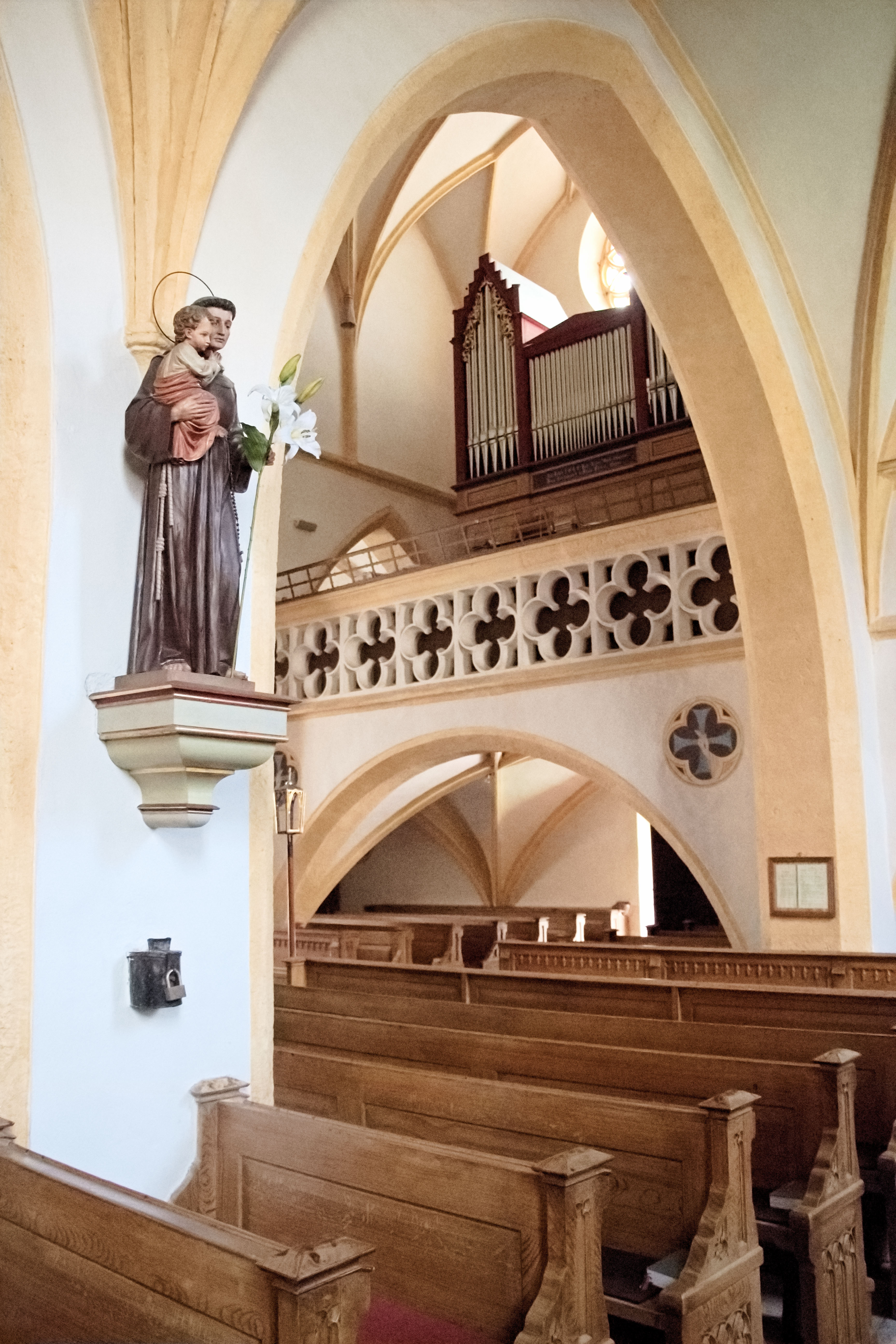 Innenraum der Pfarrkirche von Pfarrwerfen (Bezirk St. Johann im Pongau)